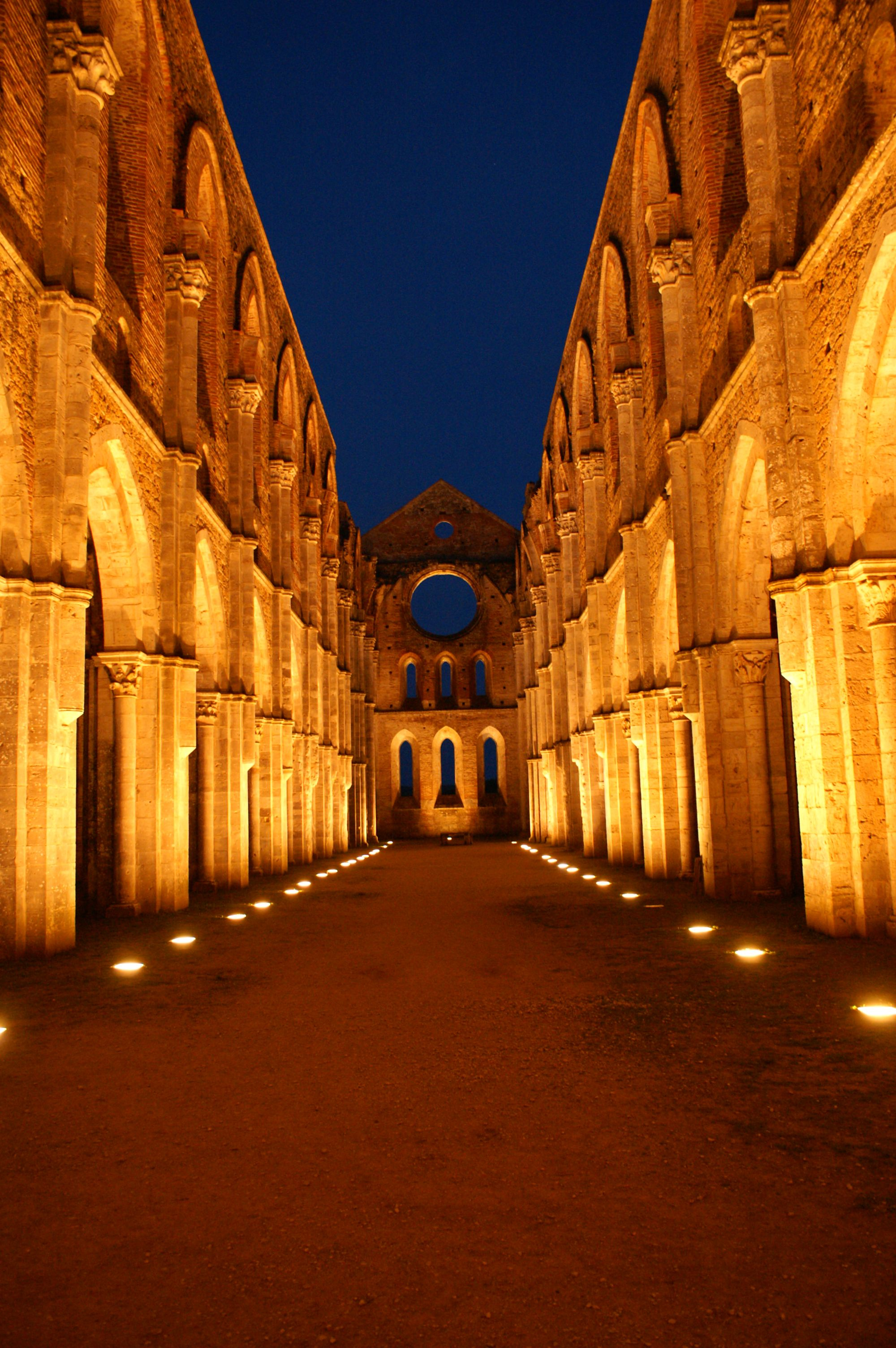 Ruine San Galgano bei Nacht andere Version: Bild:Italy tuscany sangalgano3.jpg